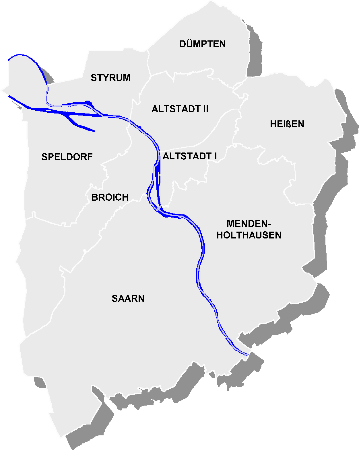 Lage Stadtteile in Mülheim an der Ruhr